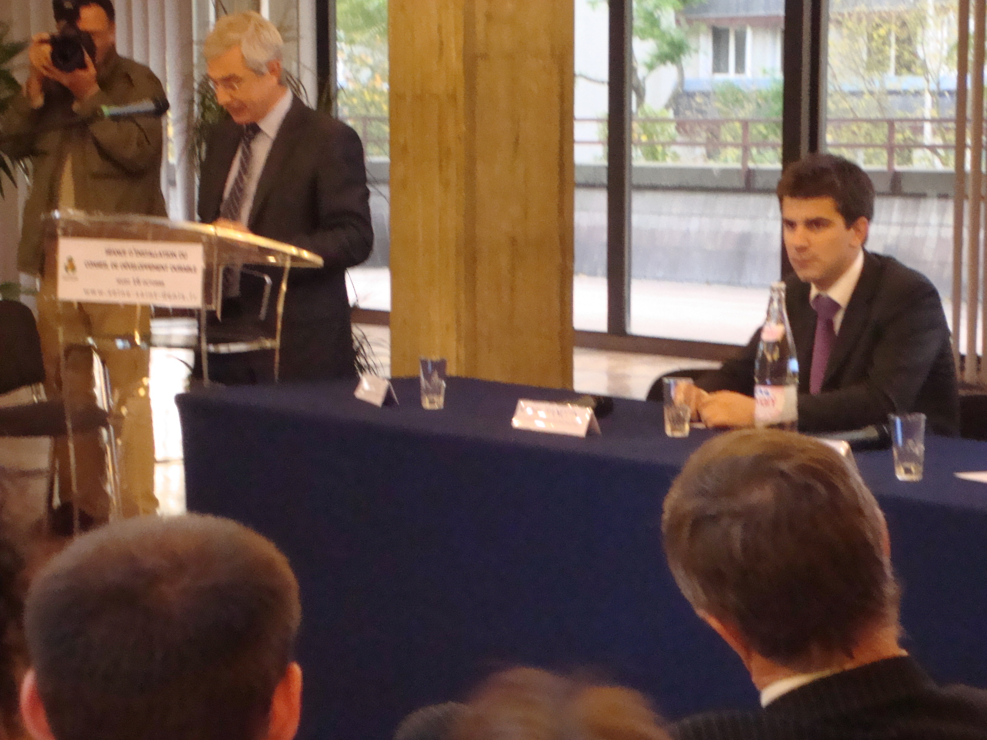 Le député et président du Conseil général de Seine-Saint-Denis Claude Bartolone (à gauche) et le conseiller général Matthieu Hanotin (à droite).